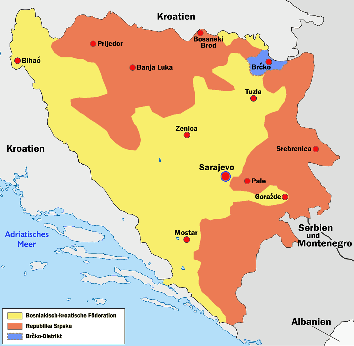 Politische Karte von Bosnien und Herzegowina mit den beiden Entitäten Föderation Bosnien und Herzegowina und Republika Srpska sowie dem Brčko-Distrikt. Urheber: wolpertinger 15:34, 14. Apr 2005 (CEST)